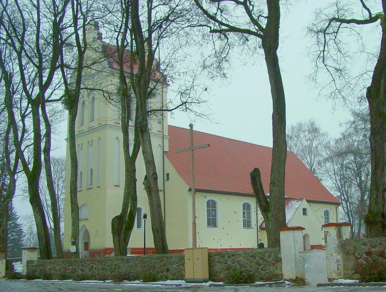 Kościół parafialny p.w. Wniebowzięcia Najświętszej Marii Panny